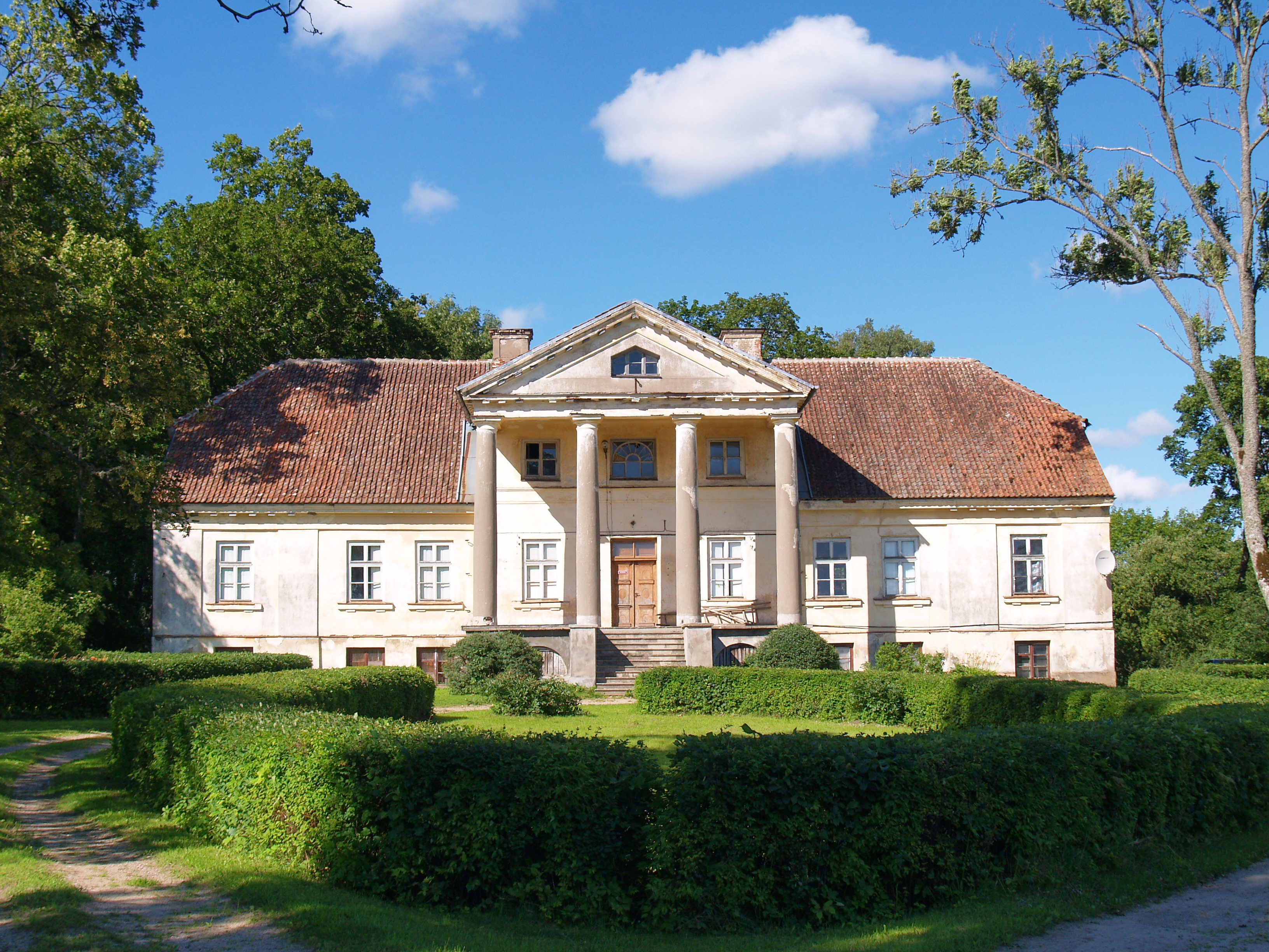 Padures muiža (Padure manor)